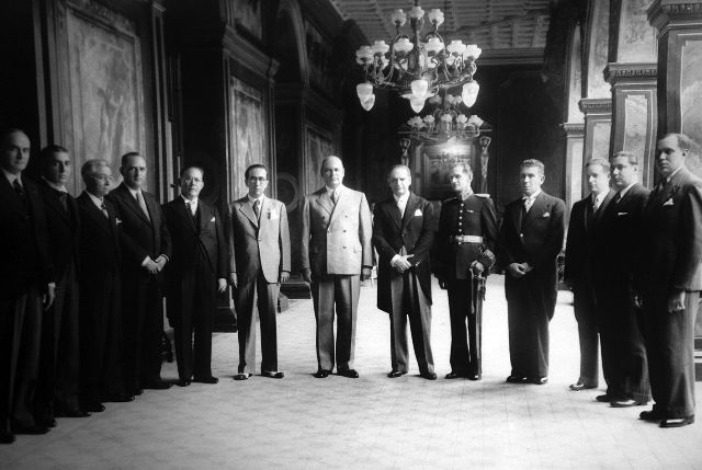 Isaías Medina Angarita y su gabinete de gobierno.